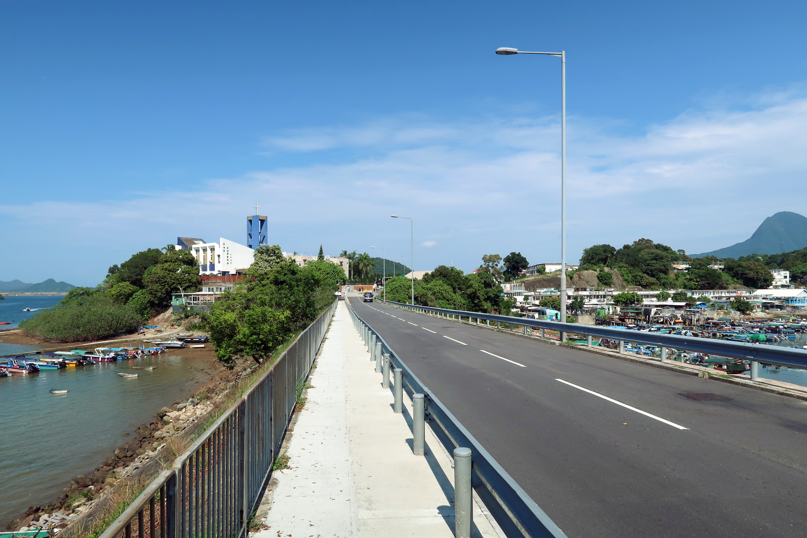 Sam Mun Tsai Road